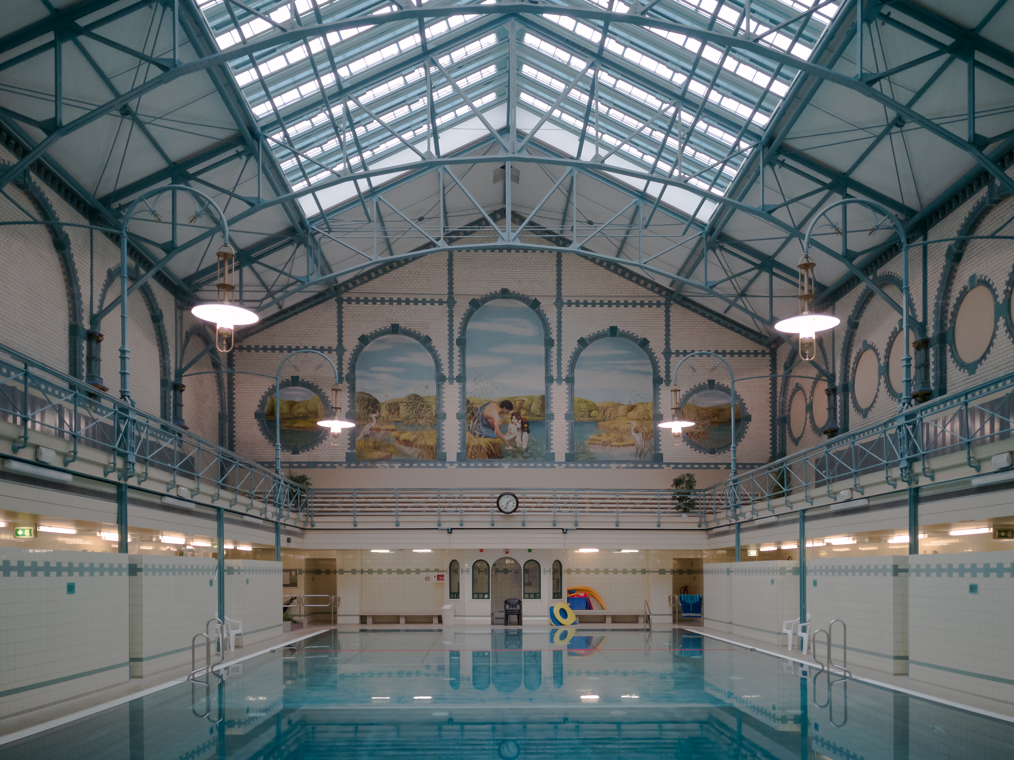 Städtische Volksbadeanstalt, Obj.-Dok.-Nr. 09096277, Krumme Straße 10, Charlottenburg-Wilmersdorf, Berlin